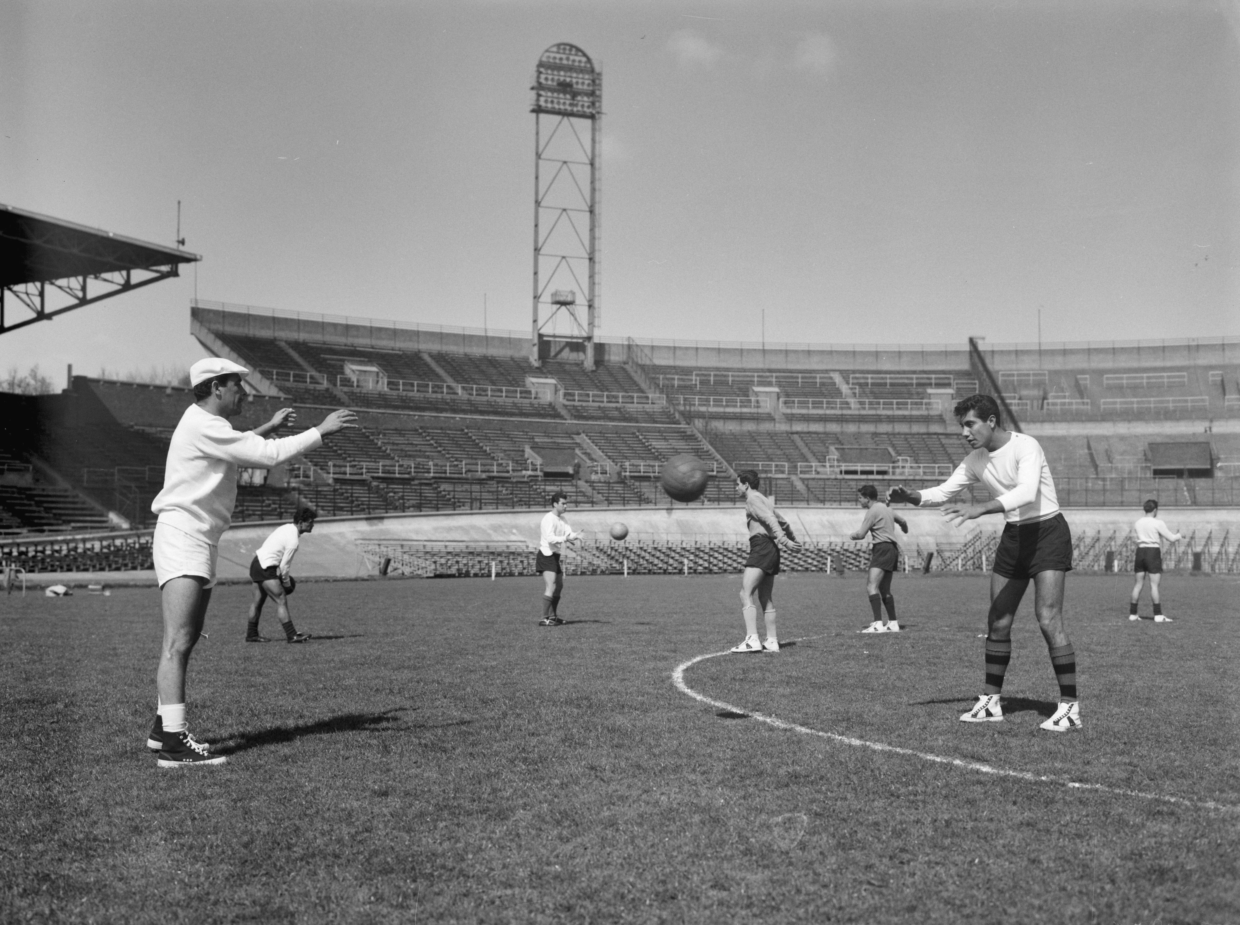 Collectie / Archief : Fotocollectie Anefo Reportage / Serie : Training van de Mexicaanse voetballers in het Olympisch Stadion Beschrijving : [Mexicaanse voetballers gooien ballen over] Annotatie : Links wellicht de Mexicaanse trainer: Ignacio Trelles Datum : 18 april 1961 Locatie : Amsterdam Trefwoorden : sport, stadions, voetbal, voetballers, voetbalvelden Fotograaf : Rossem, Wim van / Anefo Auteursrechthebbende : Nationaal Archief Materiaalsoort : Negatief (zwart/wit) Nummer archiefinventaris : bekijk toegang 2.24.01.04 Bestanddeelnummer : 912-3644